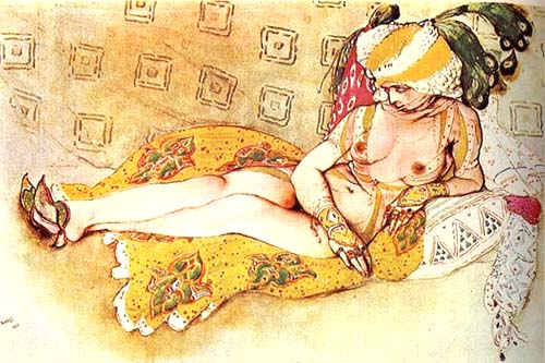 Желтая султанша. По мотивам балета «Шахерезада» 1916